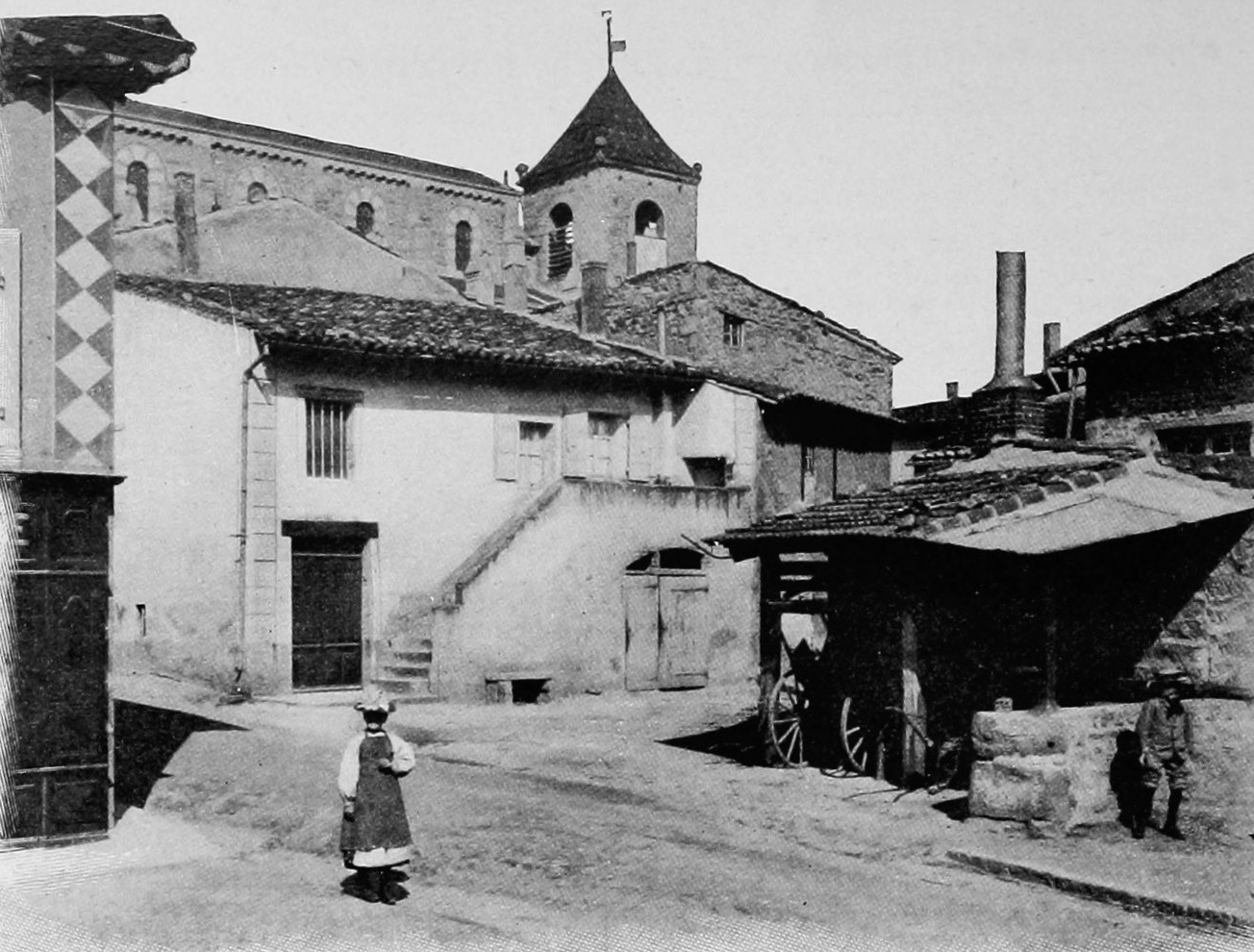 Dictionnaire illustré des communes du département du Rhône. Tome 2 / par MM. E. de Rolland et D. Clouzet.